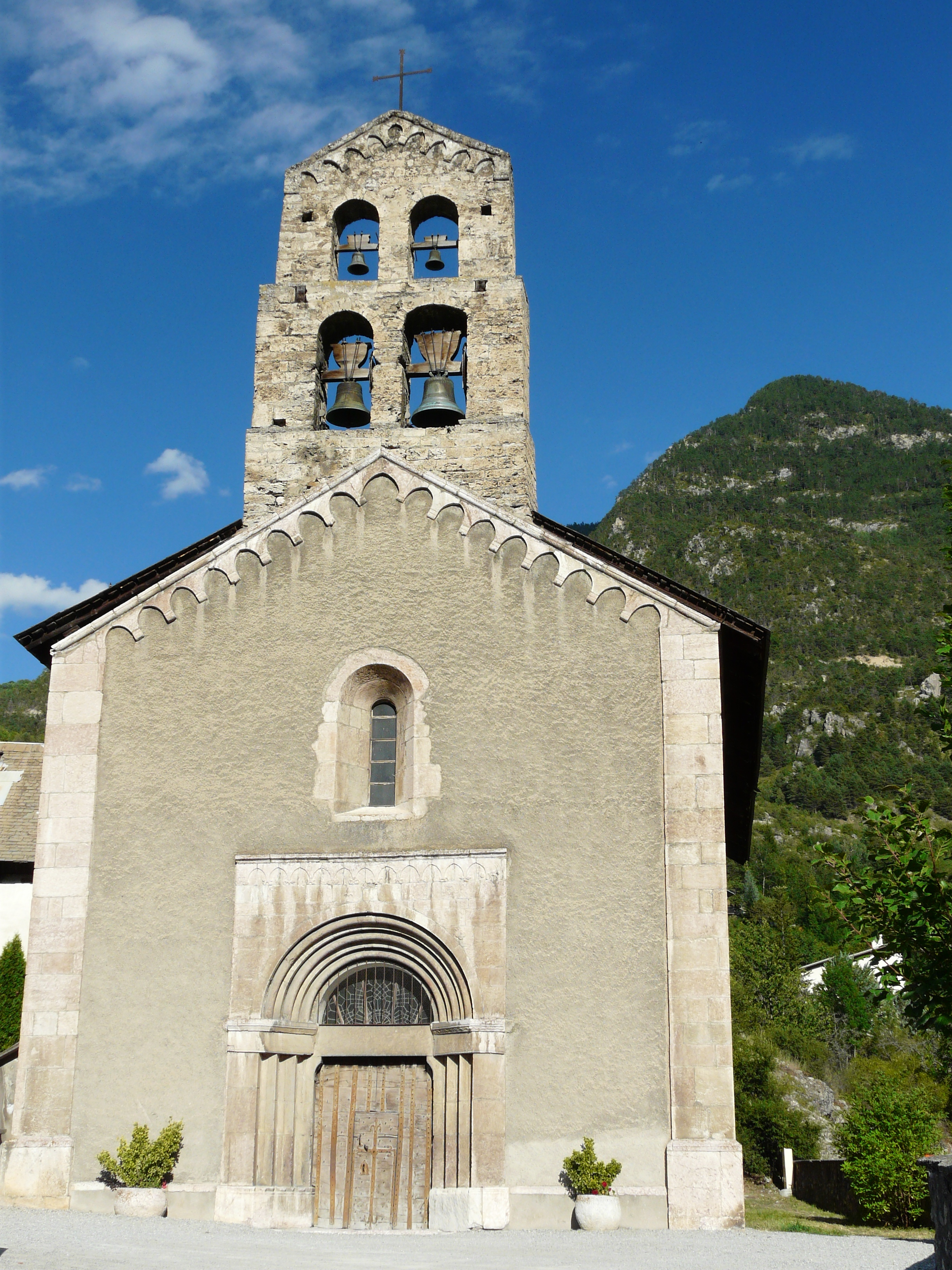 Église Saint-Laurent de La Roche-de-Rame (Classé) .